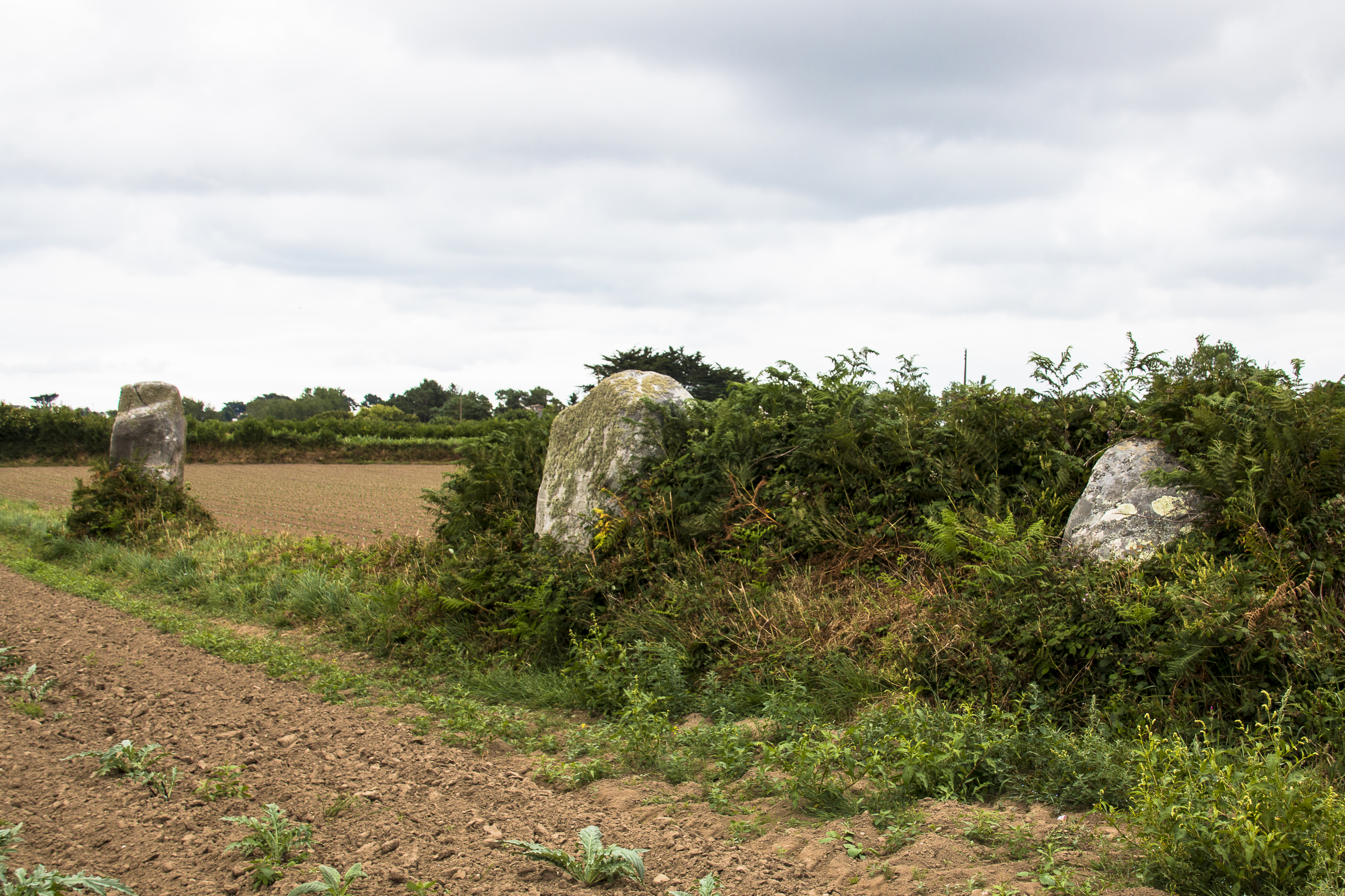 Alignement de Poul-ar-Varquez (Pleubian)